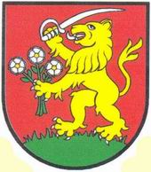 Patonyrét (Potônske Lúky) szlovákiai község címere